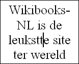 tikfout